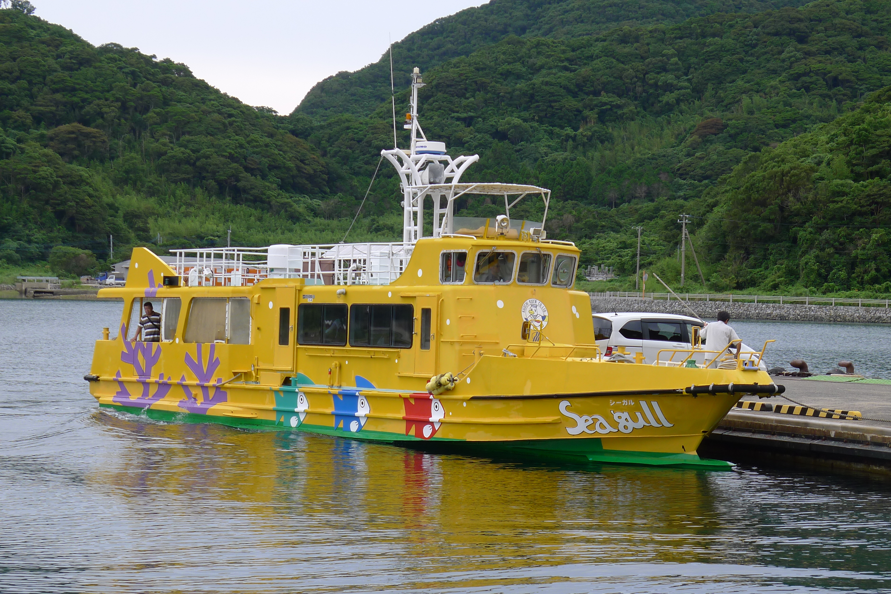 久賀島田ノ浦港に停泊中のシーガル、福江島福江港～久賀島を結ぶ高速艇